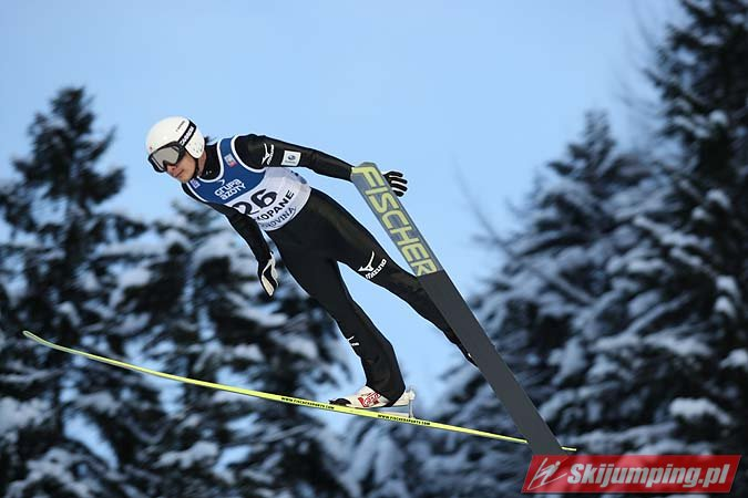 Puchar Świata w Zakopanem 2012/2013 – konkurs indywidualny (12 stycznia 2013)